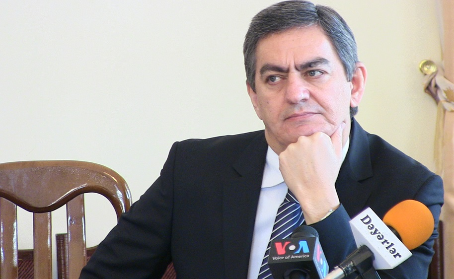 Ali Karimli